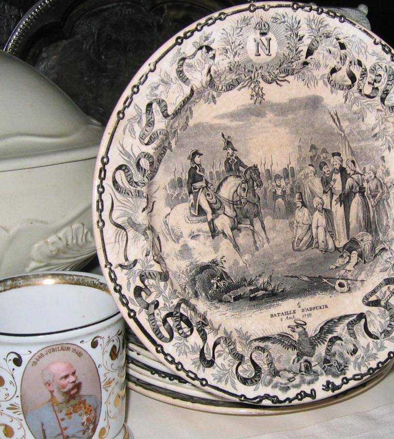 Grad Tuštanj, ročno poslikani porcelanski krožnik s prizorom iz napoleonove vojne.